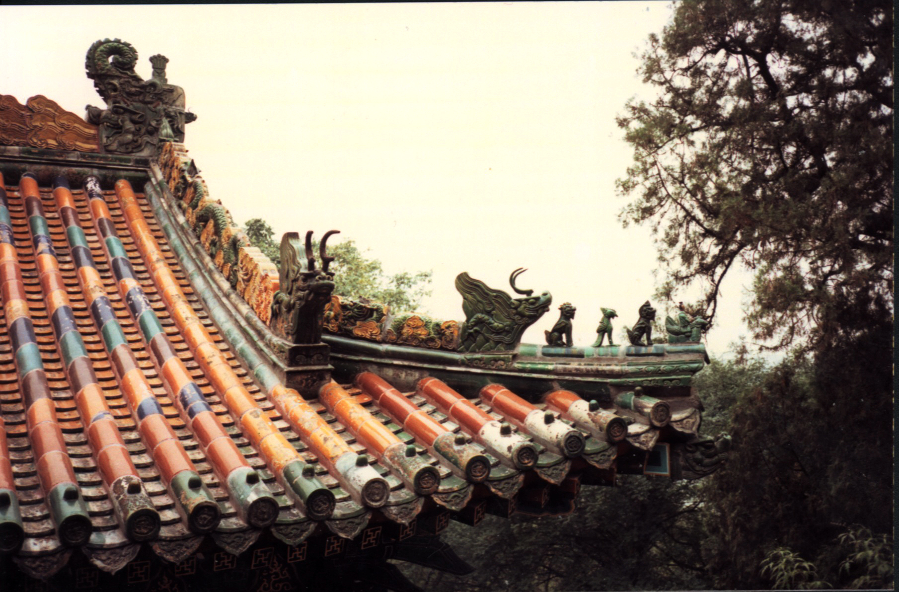 琉璃瓦, glazed tile